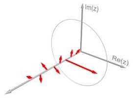 Graficzny opis rejestru kubitowego